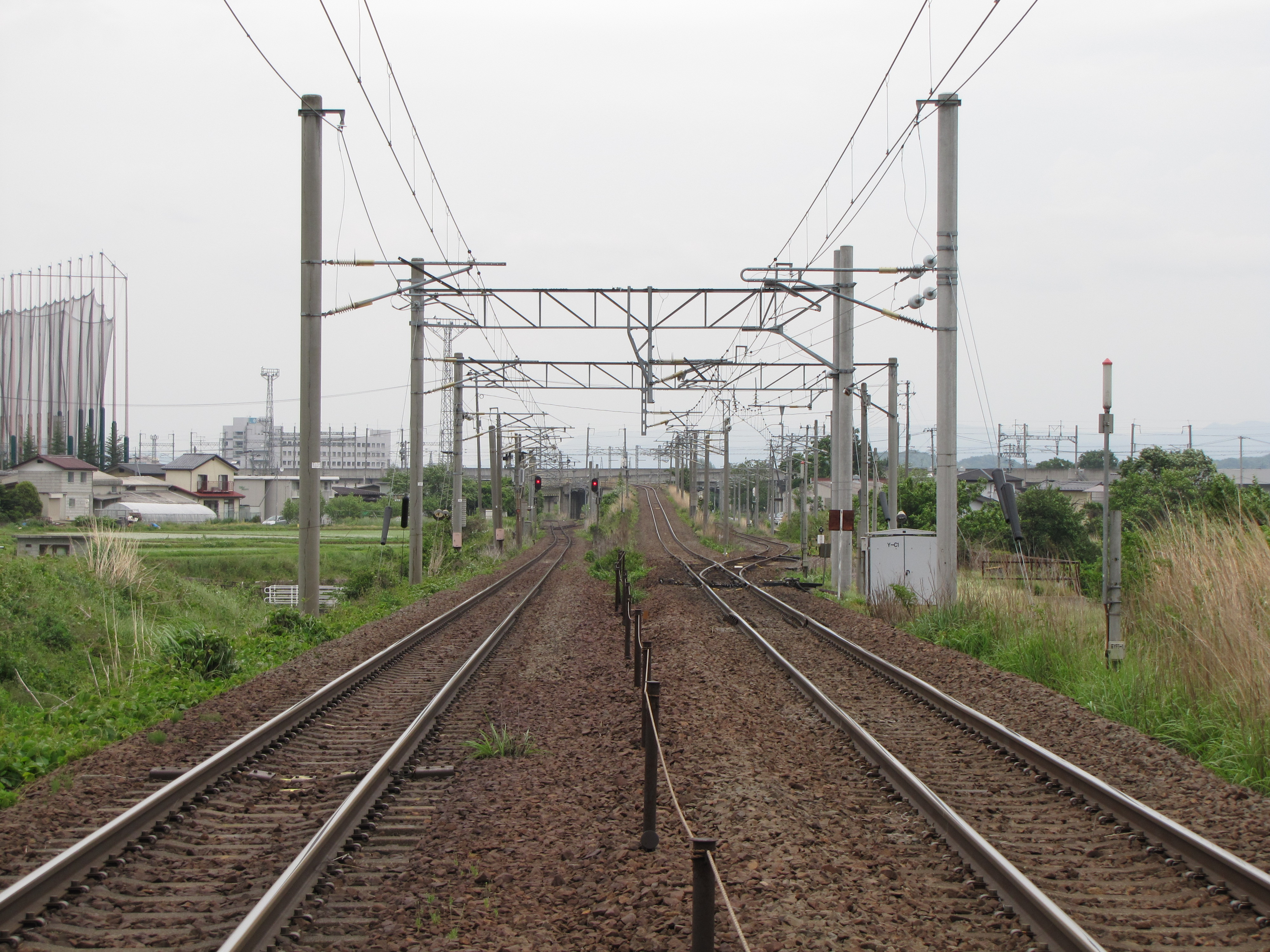 東北本線 矢野目信号場 （上野側から撮影）